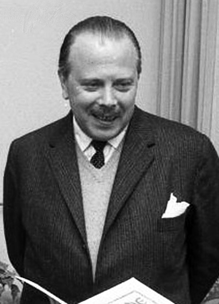 Title: Sportabzeichen an Freiherrn von Guttenberg Extra information: Regierungsdirektor Bücker und der Schulmeister verleihen Karl Theodor Freiherr von und zu Guttenberg (Mitte) das Silberne Sportabzeichen People in the image: Guttenberg, Karl Theodor von Freiherr: Bundestagsabgeordneter (MdB), CSU, Bundesrepublik Deutschland Factual corrections and alternative descriptions are encouraged separately from the original description. Additionally errors can be reported at this page to inform the Bundesarchiv. Original historic description: Regierungsdirektor Bücker und Herr Schulmeister verleihen Freiherrn von Guttenberg das Silberne Sportabzeichen